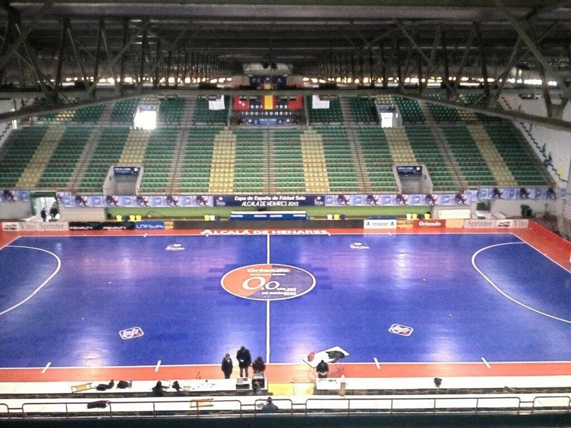 gradas pabellon montemadrid